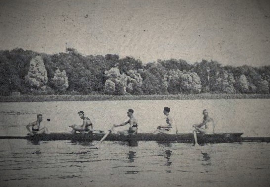 Polska czwórka ze sternikiem z reprezentantami na igrzyska olimpijskie w Berlinie w 1936, podczas obozu przygotowawczego przed igrzyskami, który odbył się w Kruszwicy. Na zdjęciu dwóch zawodników WKS Śmigły Wilno, Zawadzki i Korwecki (drugi i trzeci od lewej), oraz KW 04, Kuryłowicz i Leporowski (czwarty i piąty od lewej). Sternik Wierszyłło (pierwszy od lewej) na igrzyska nie pojechał.